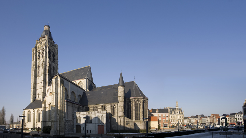 Sint-Walburgakerk, Oudenaarde, Belgium